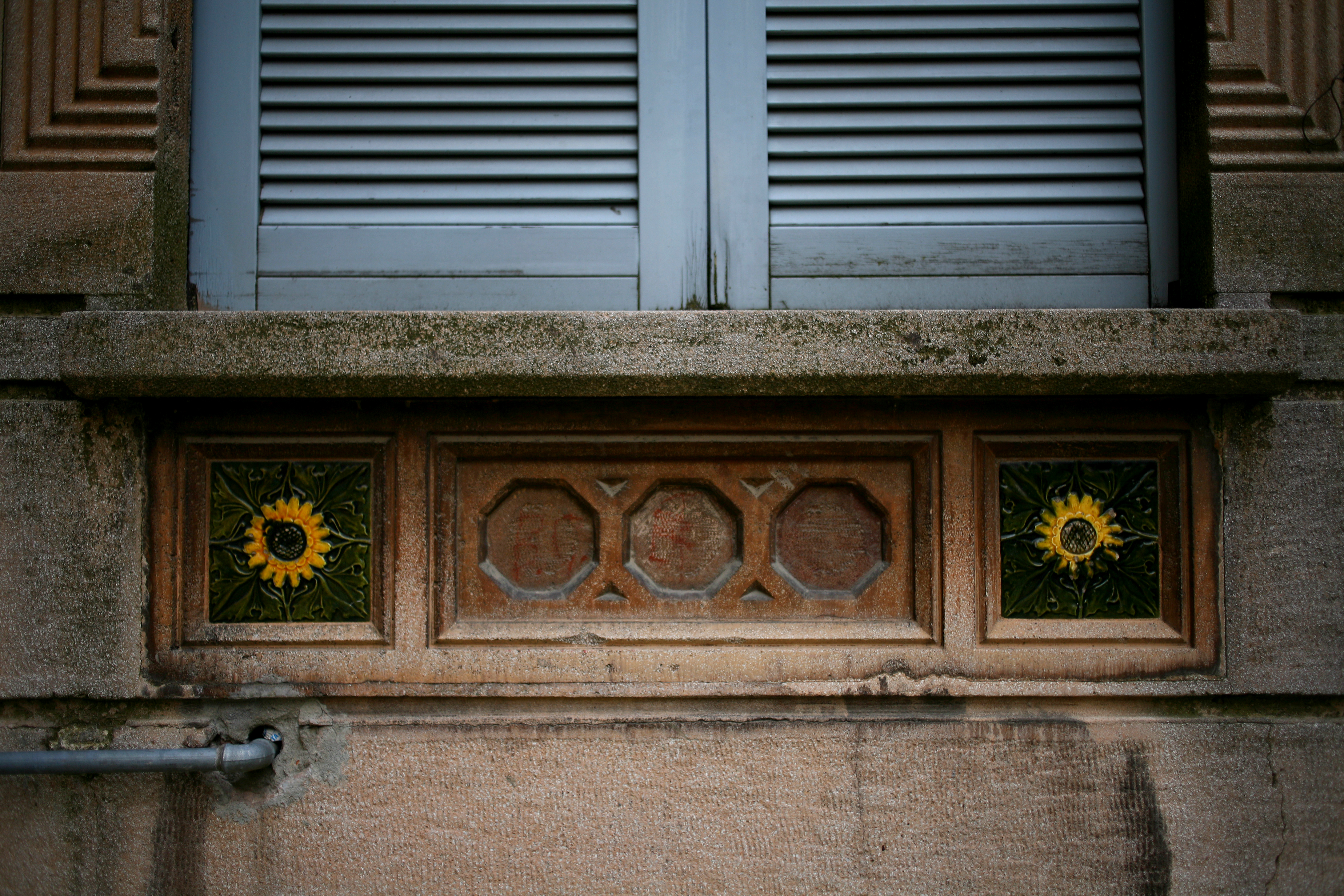 Primo quartiere popolare di via Solaro (oggi via Solari) a Milano, edificato nel 1906 dall'architetto Giovanni Broglio per contro della Società Umanitaria